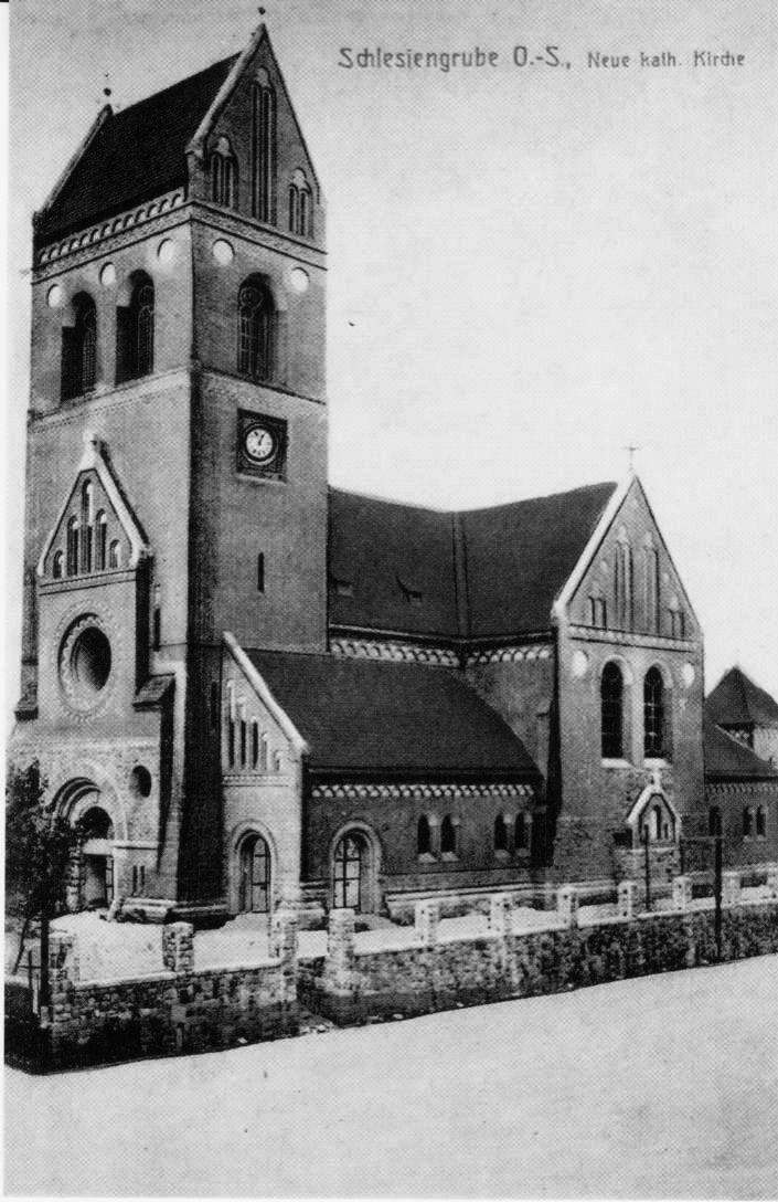 Projekt Kosciola Matki Bozej Rozancowej w Swietochlowicach